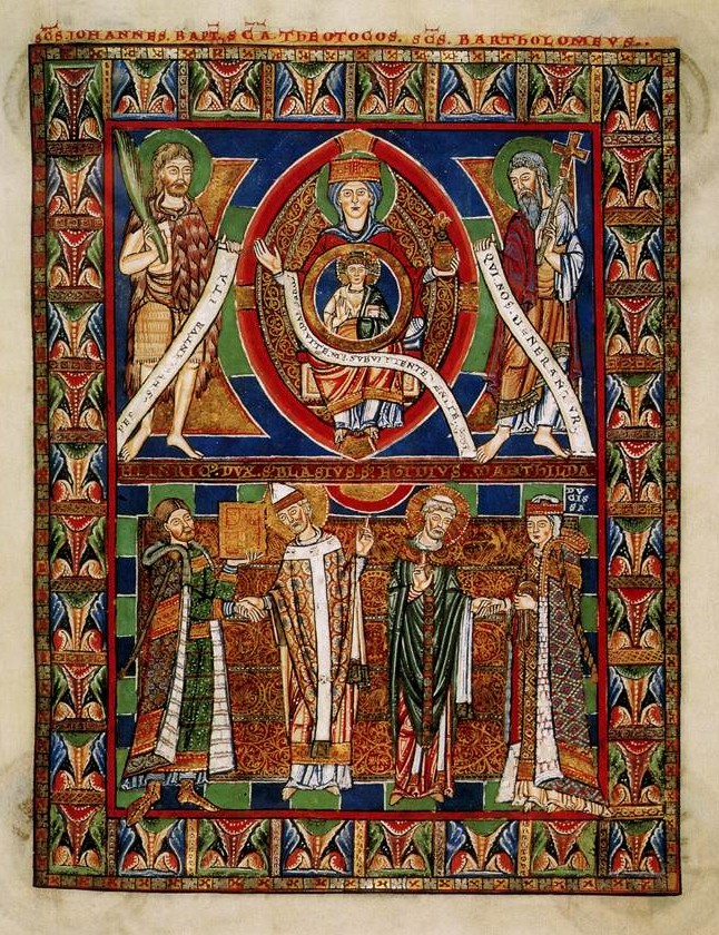 Evangeliář Jindřicha Lva